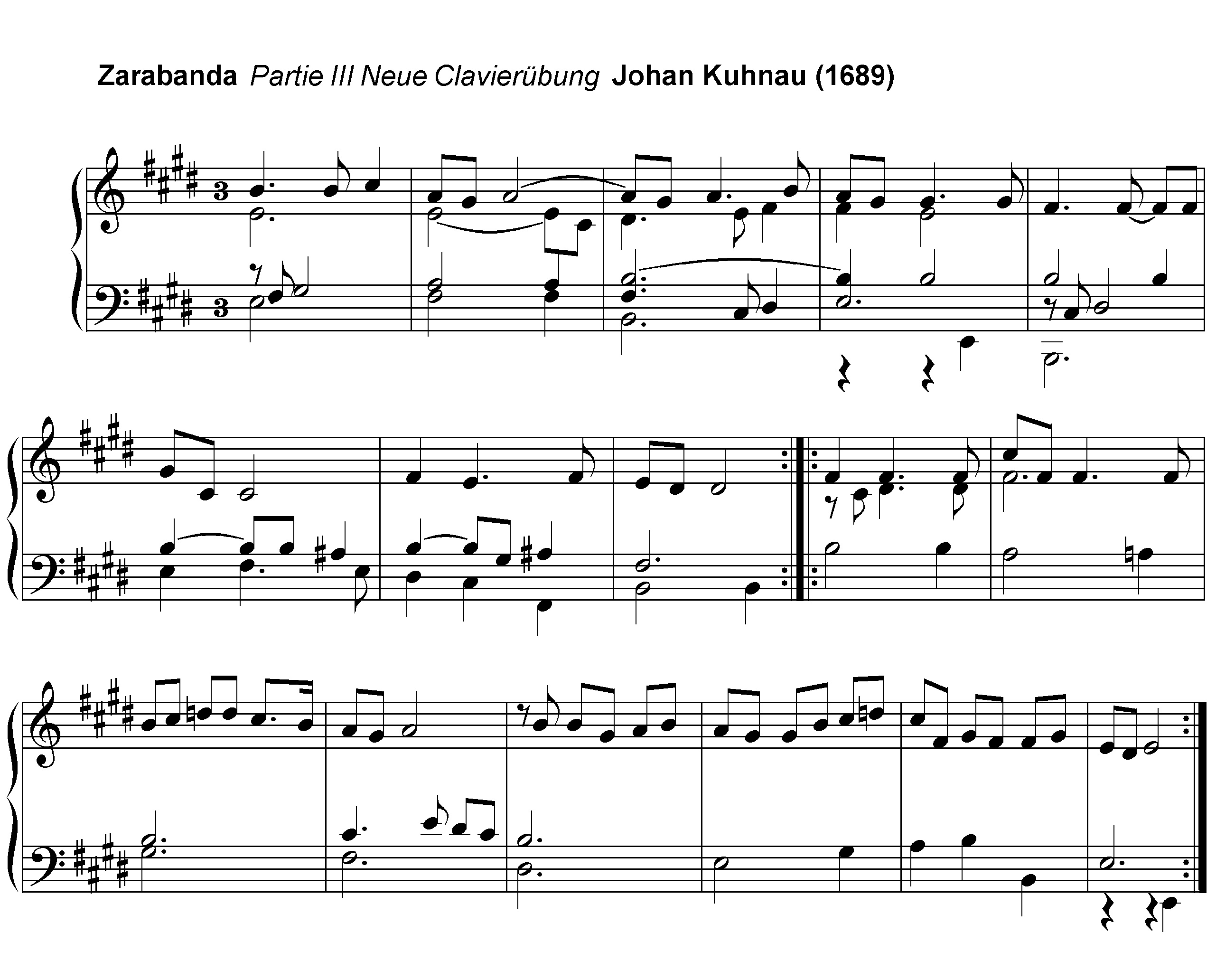 Zarabanda de Johan Kuhnau on es pot veure una forma binària de dues frases